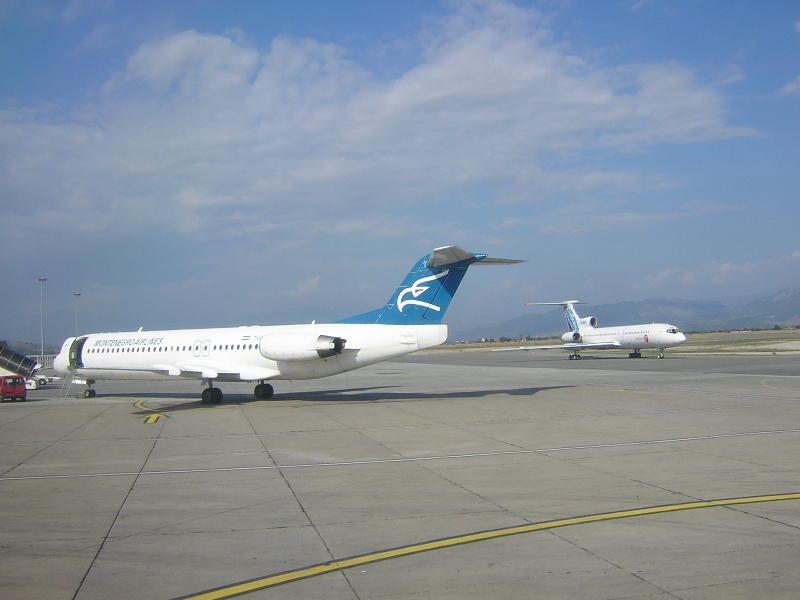 Podgorica